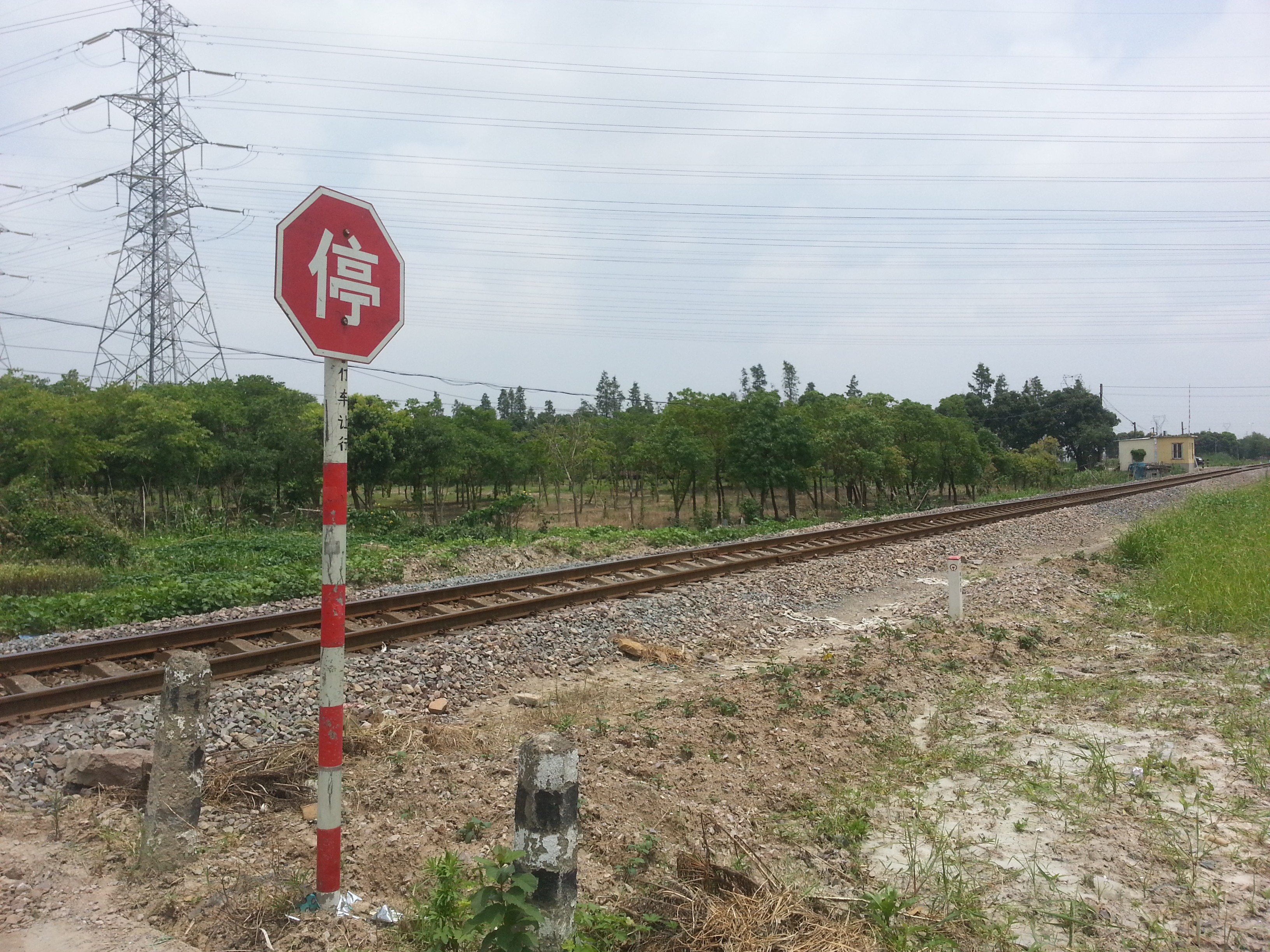 洪镇铁路，2015-07-18